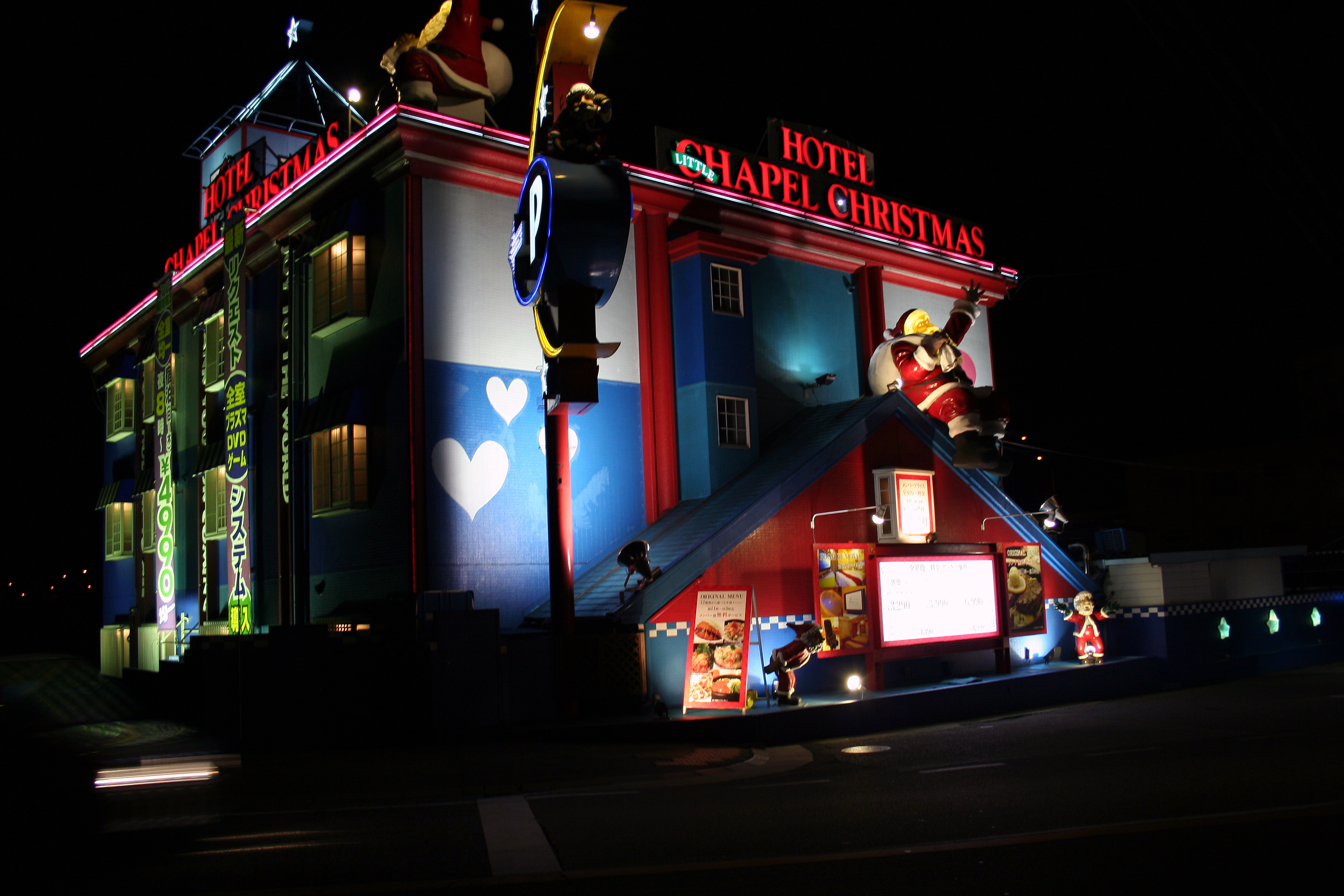 ホテル・リトルチャペルクリスマス。姫路東ランプの北側の道の周囲に集まるラブホテルの一つ。この辺には11件のラブホテルが集まっている。